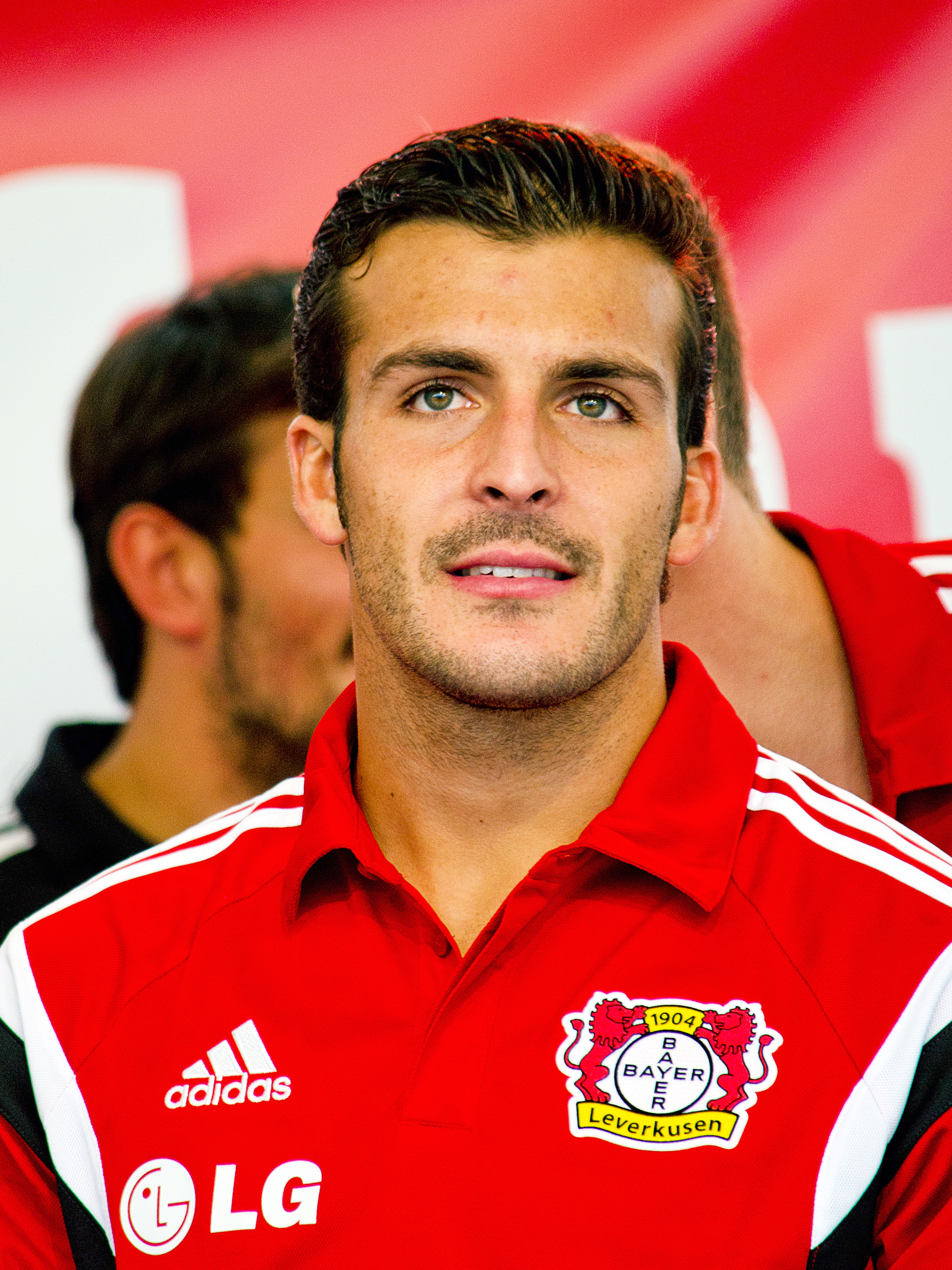 Giulio Donati, italienischer Fußballspieler